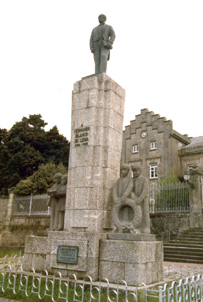 Monumento a Fernando Blanco de Lema, hecho en 1973, en Cee, Galicia, España.